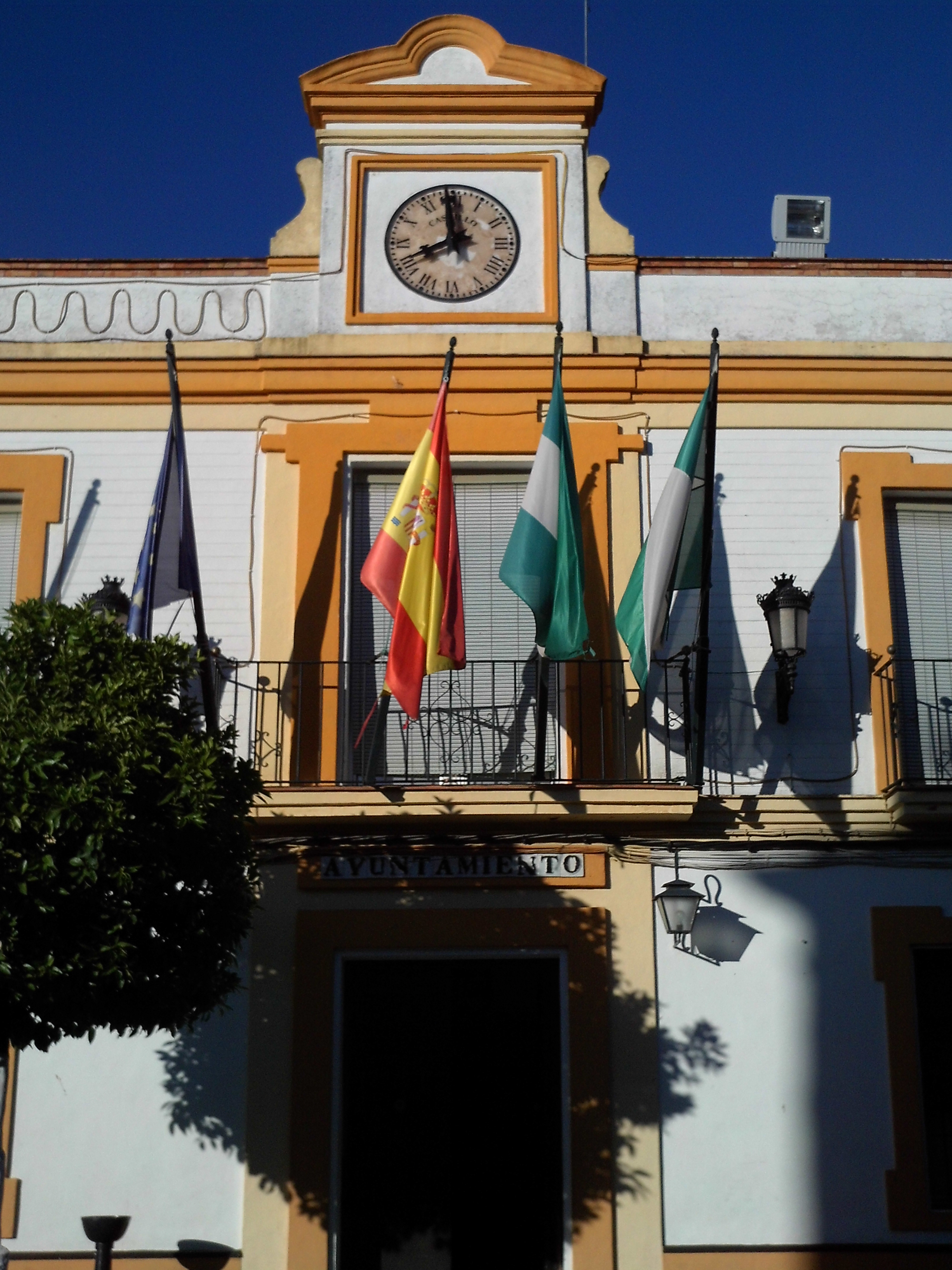 Ayuntamiento de la localidad sevillana de Carrión de los Céspedes